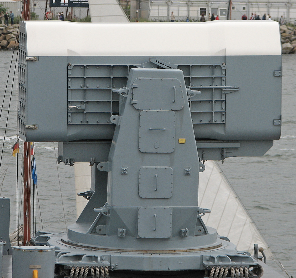 Beschreibung: RIM-116 Rolling Airframe Missile (RAM) Launcher auf der Fregatte Mecklenburg-Vorpommern Fotograf: Darkone, 13. August 2005